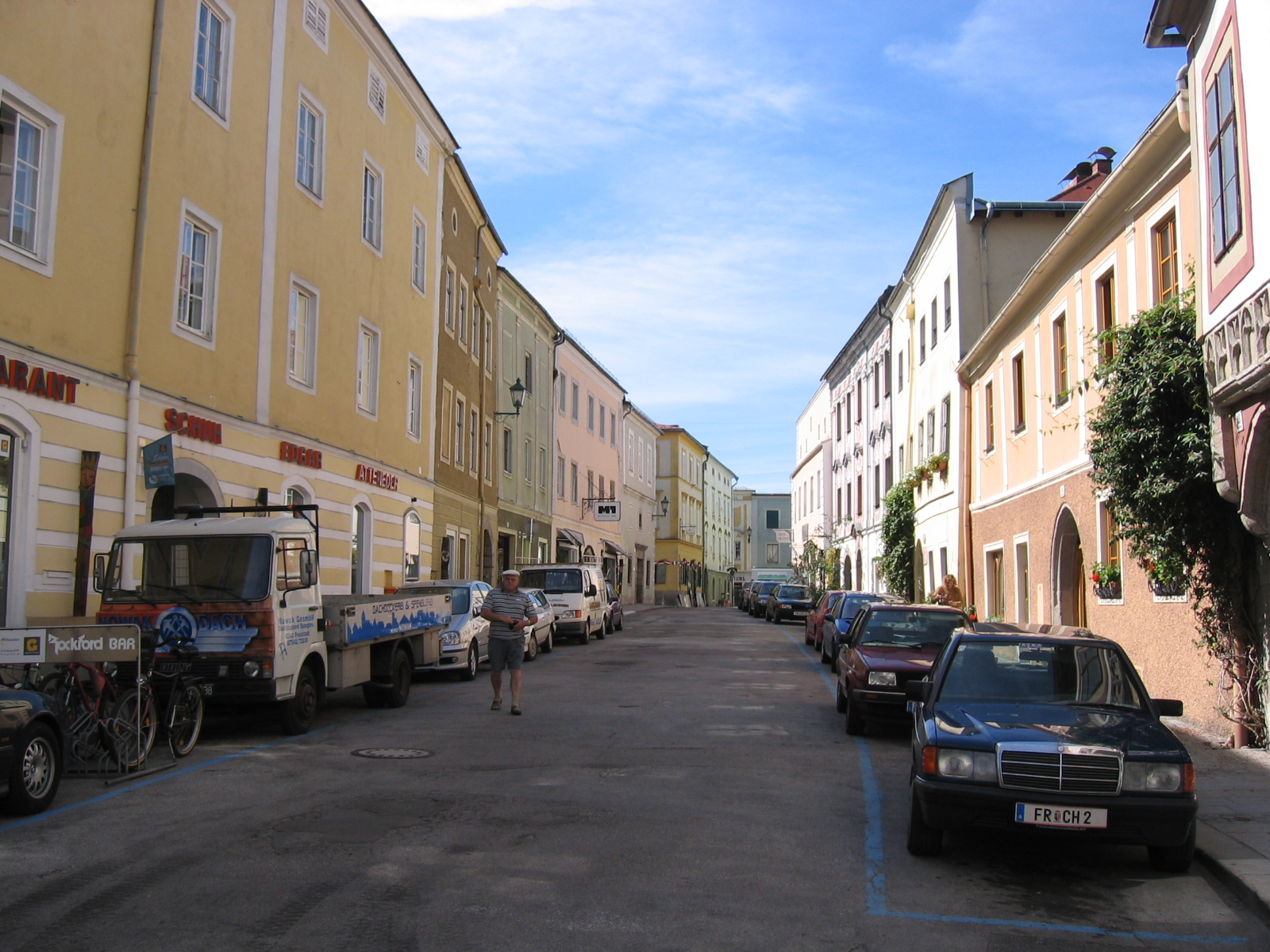 Waaggasse - typische Gasse in Altstadt